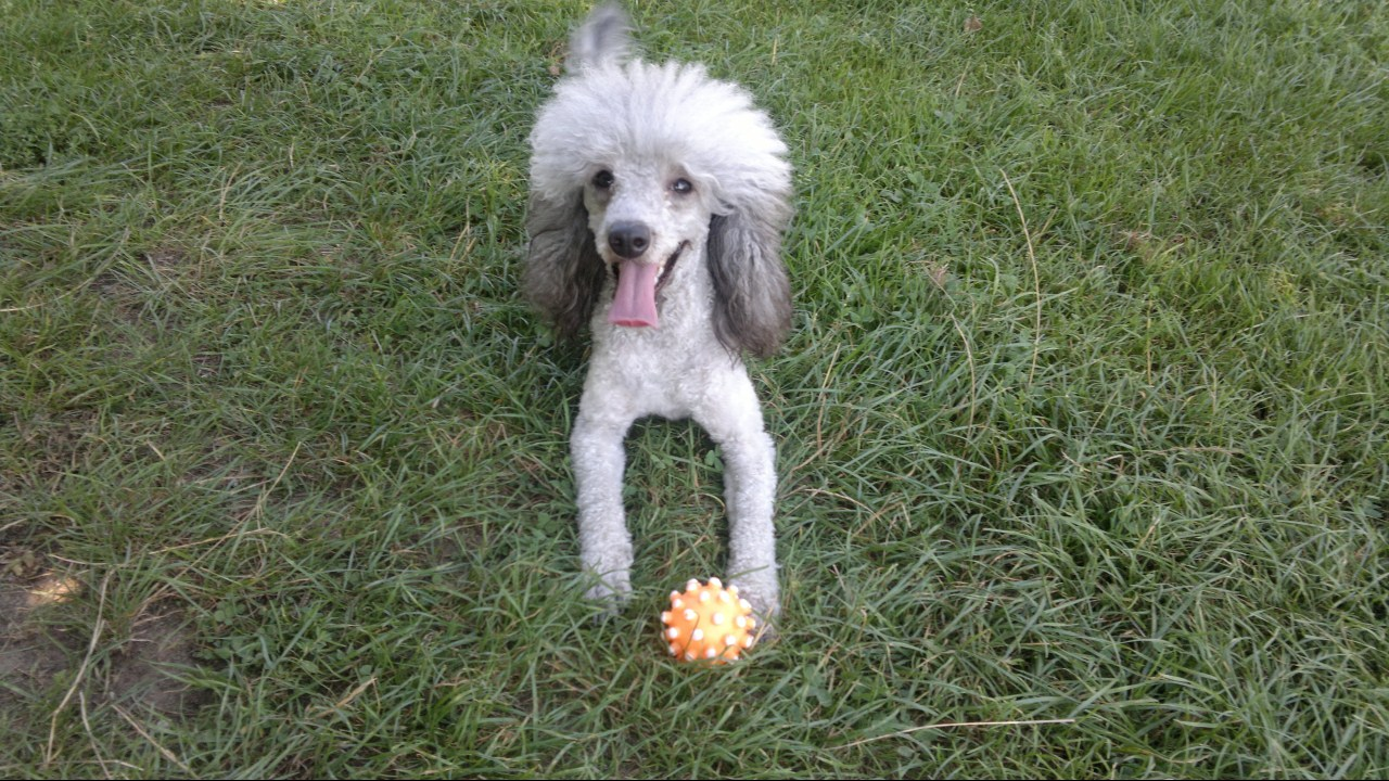 Le caniche : un chien joyeux et joueur.